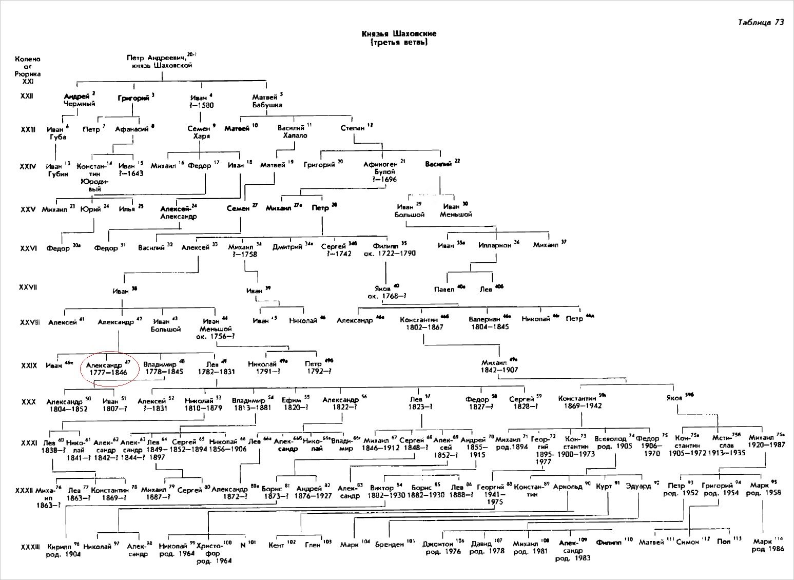 родословная Шаховских (3 ветвь)